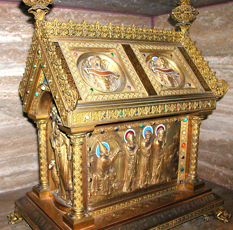 Вид сбоку на мощевик свв. Виро, Плехельма и Отгера